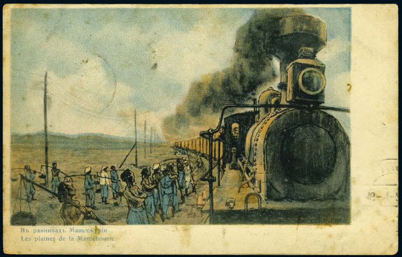 Les plaines de la Mantchourie